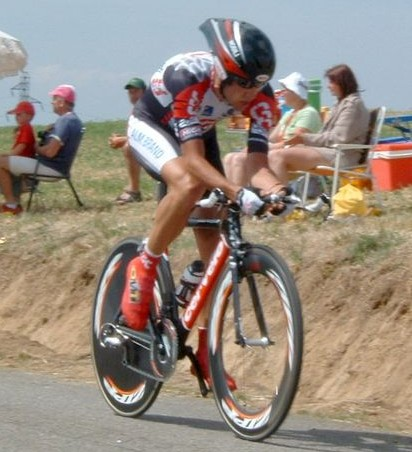 Carlos sastre, Tour de France 2005